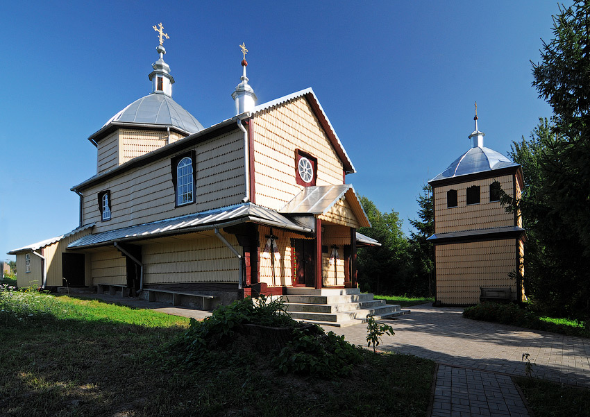 Церква Непорочного зачаття Пресвятої Богородиці в Вислобоках